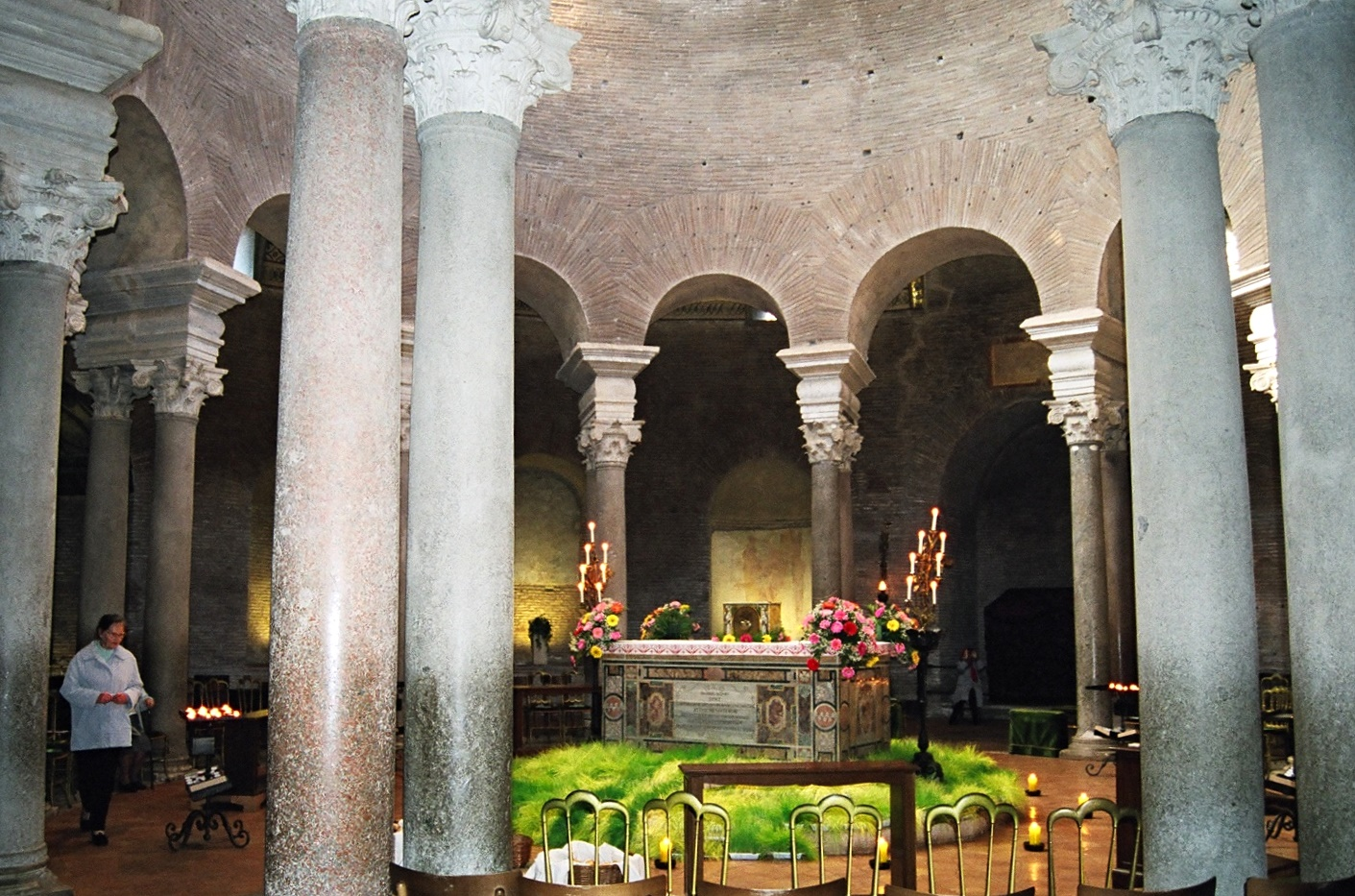 descripció Mausoleu de Santa Costanza. Roma. Interior